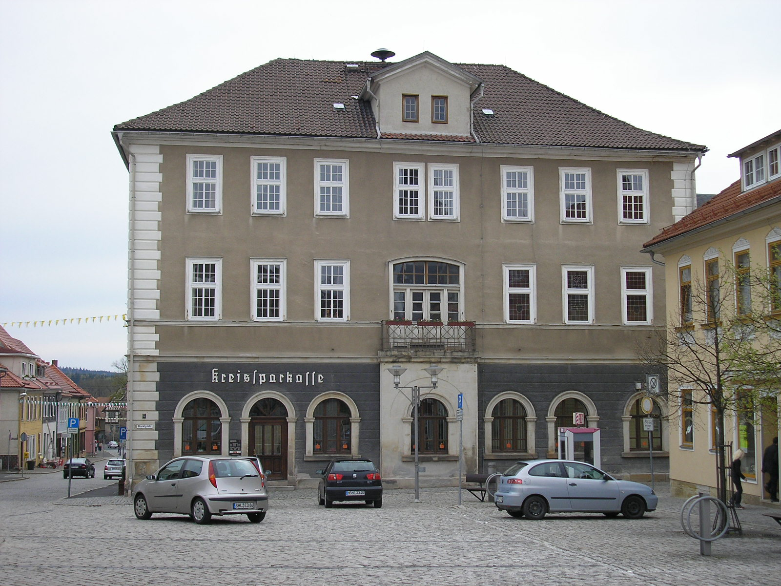 Das Rathaus in Eisfeld (Thüringen)